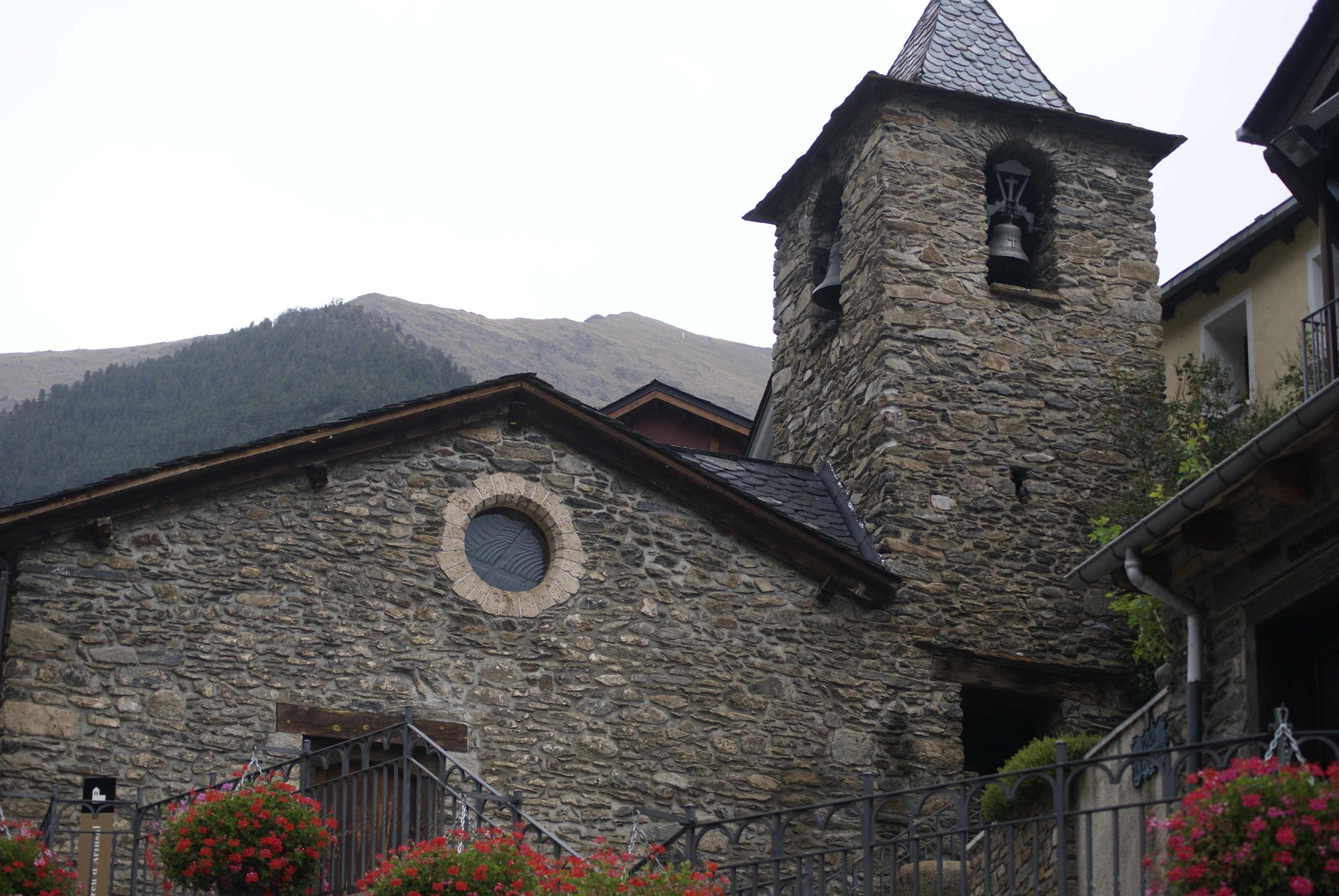 Església de Sant Andreu d'Arinsal